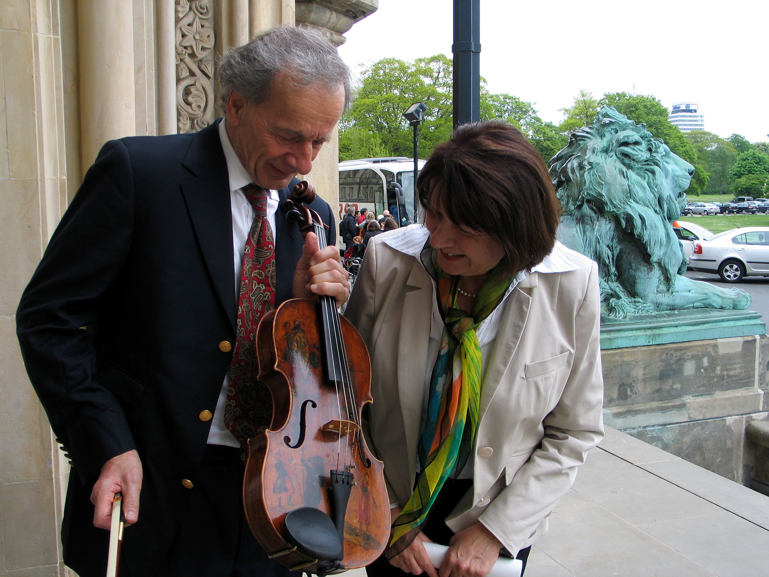 Der Bratschist Ulrich von Wrochem erläutert - nach einer musikalischen Begleitung anlässlich des 80. Jahrestages der Bücherverbrennung in Hannover - der Vizepräsidentin für Lehre, Studium und Weiterbildung der Leibniz Universität Hannover, Prof. Dr. phil. Elfriede Billmann-Mahecha, seine 300 Jahre alte Bratsche aus dem Haus Alemannische Geigenbauschule (auch: Alemannische Schule) ...